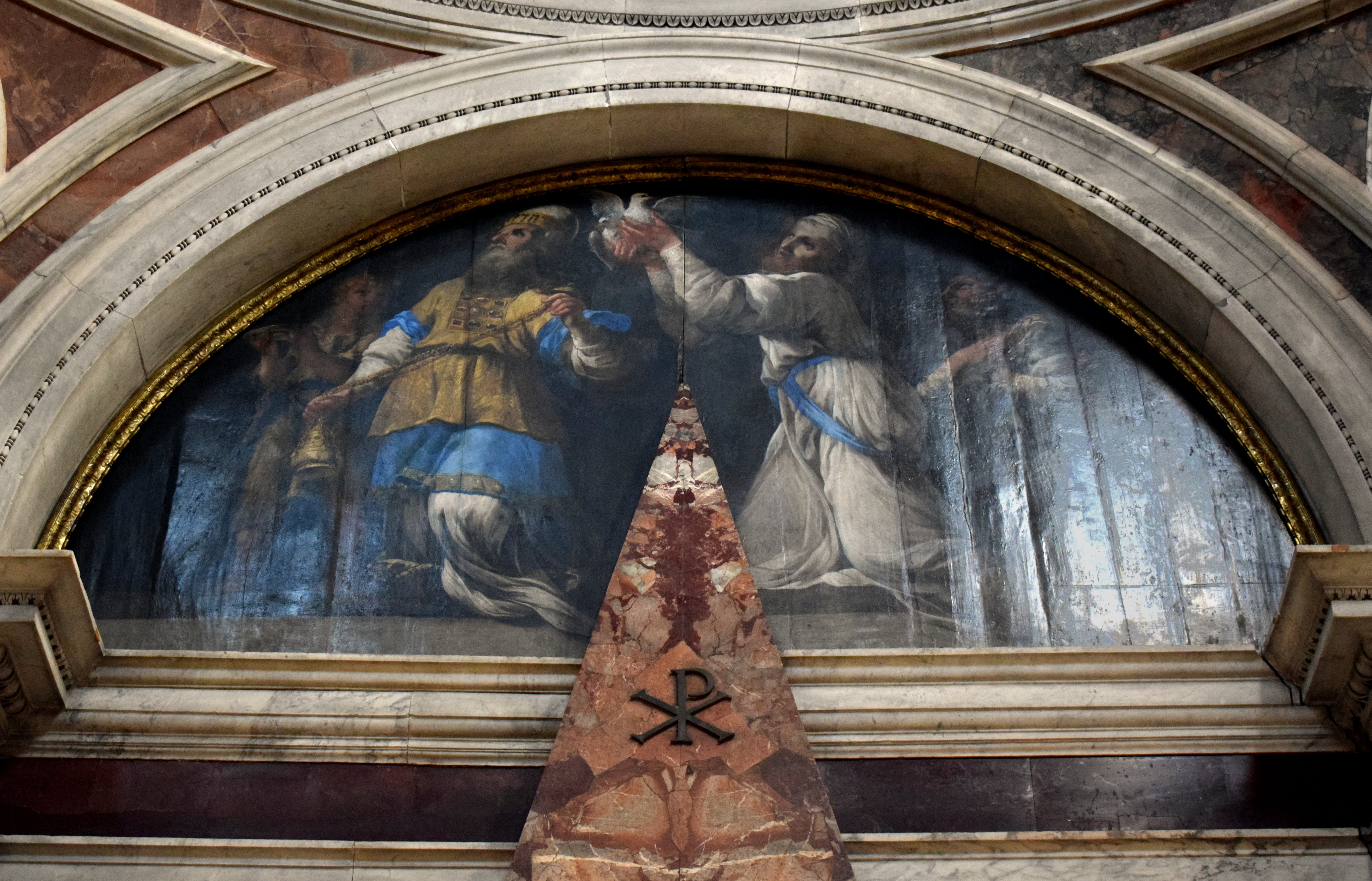 Lunette painting at the Chigi Chapel in Santa Maria del Popolo